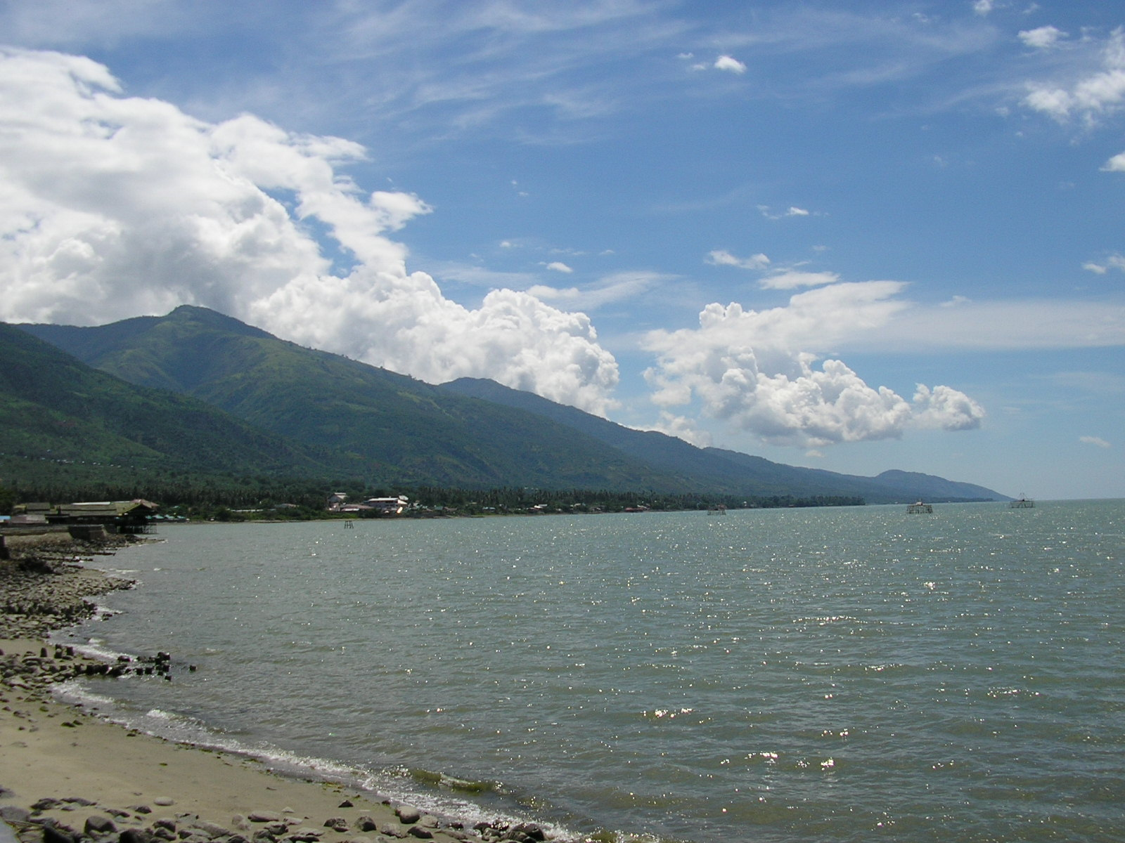 Palu Bay, Central Sulawesi, Indonesia